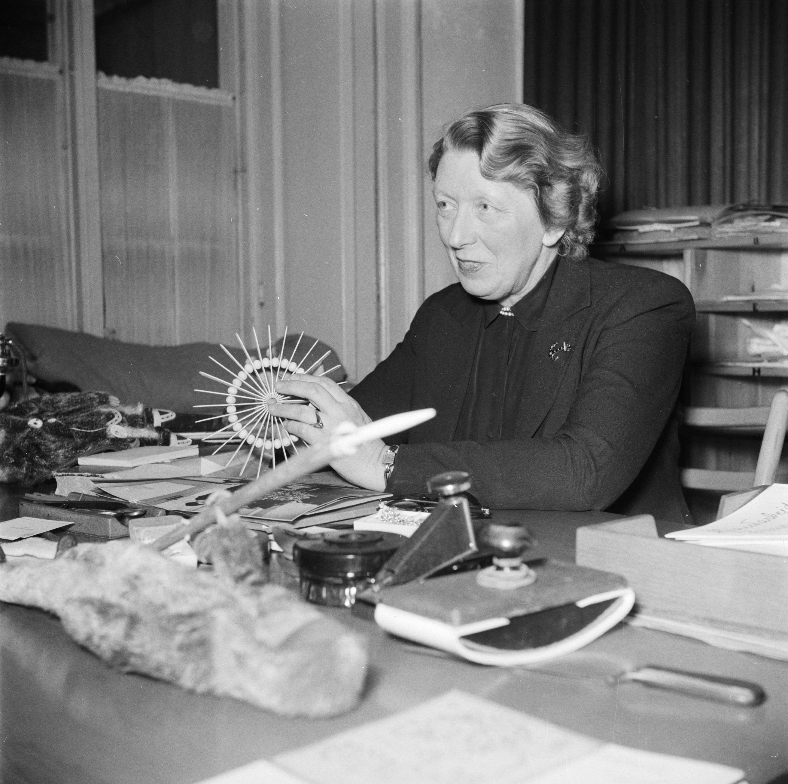 Collectie / Archief : Fotocollectie Van de Poll Reportage / Serie : Portretten van Gertie Wandel Beschrijving : Gertie Wandel, presidente van een handenarbeidclub achter haar bureau Datum : maart 1954 Locatie : Denemarken, Kopenhagen Trefwoorden : bureaus, handenarbeid, kantoorartikelen, kantoren, vrouwen Persoonsnaam : Wandel, Gertie Fotograaf : Poll, Willem van de, [onbekend] Auteursrechthebbende : Nationaal Archief Materiaalsoort : Negatief (zwart/wit) Nummer archiefinventaris : bekijk toegang 2.24.14.02 Bestanddeelnummer : 252-9001